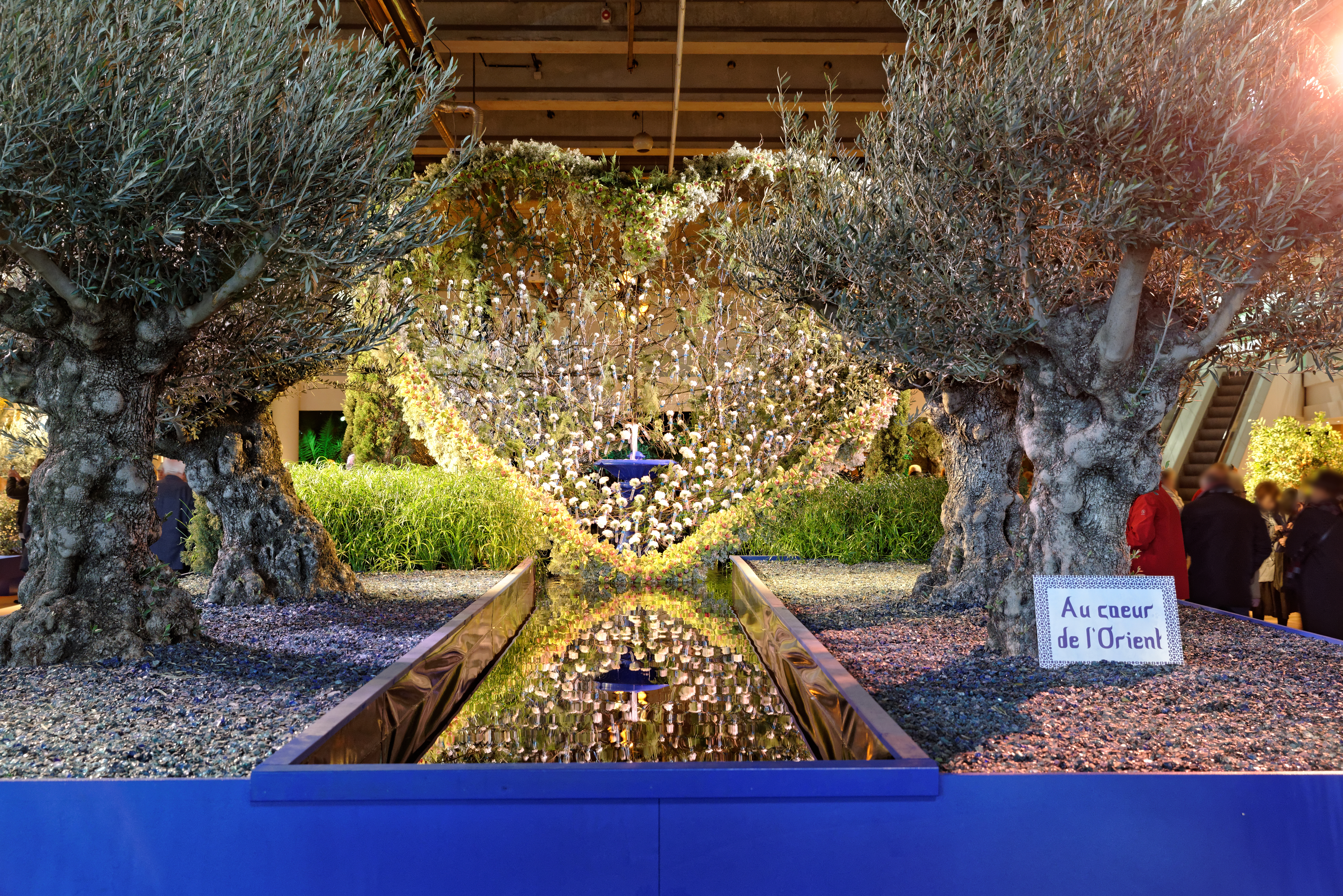 Exposition Florissimo du 19 au 29 mars 2015 (Dijon, France).